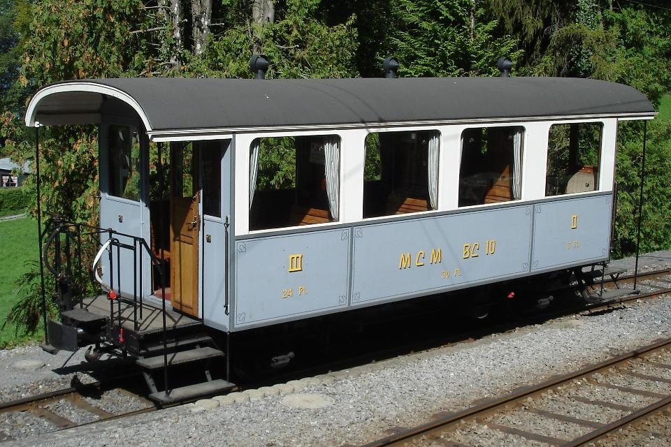 Historischer Personenwagen BC2 10 der ehemaligen Monthey–Champéry–Morgins-Bahn (MCM), heute Transports Publics du Chablais (TPC), bei der Museumsbahn Blonay–Chamby (BC) in Chamby-Musée (Chaulin) im Sommer 2010.